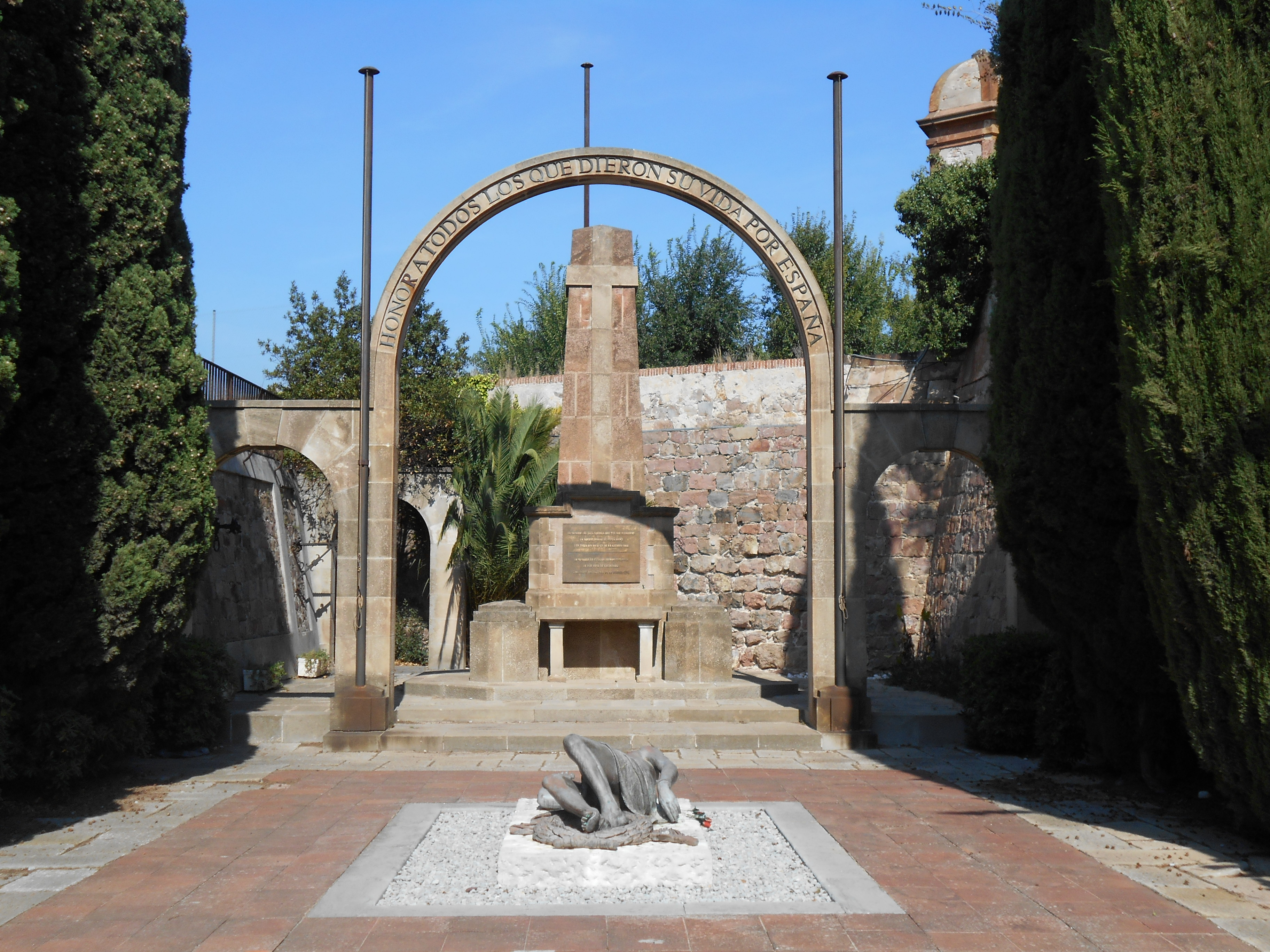 Monumento a los Caídos, Foso de Santa Elena, Castillo de Montjuïc, Barcelona.